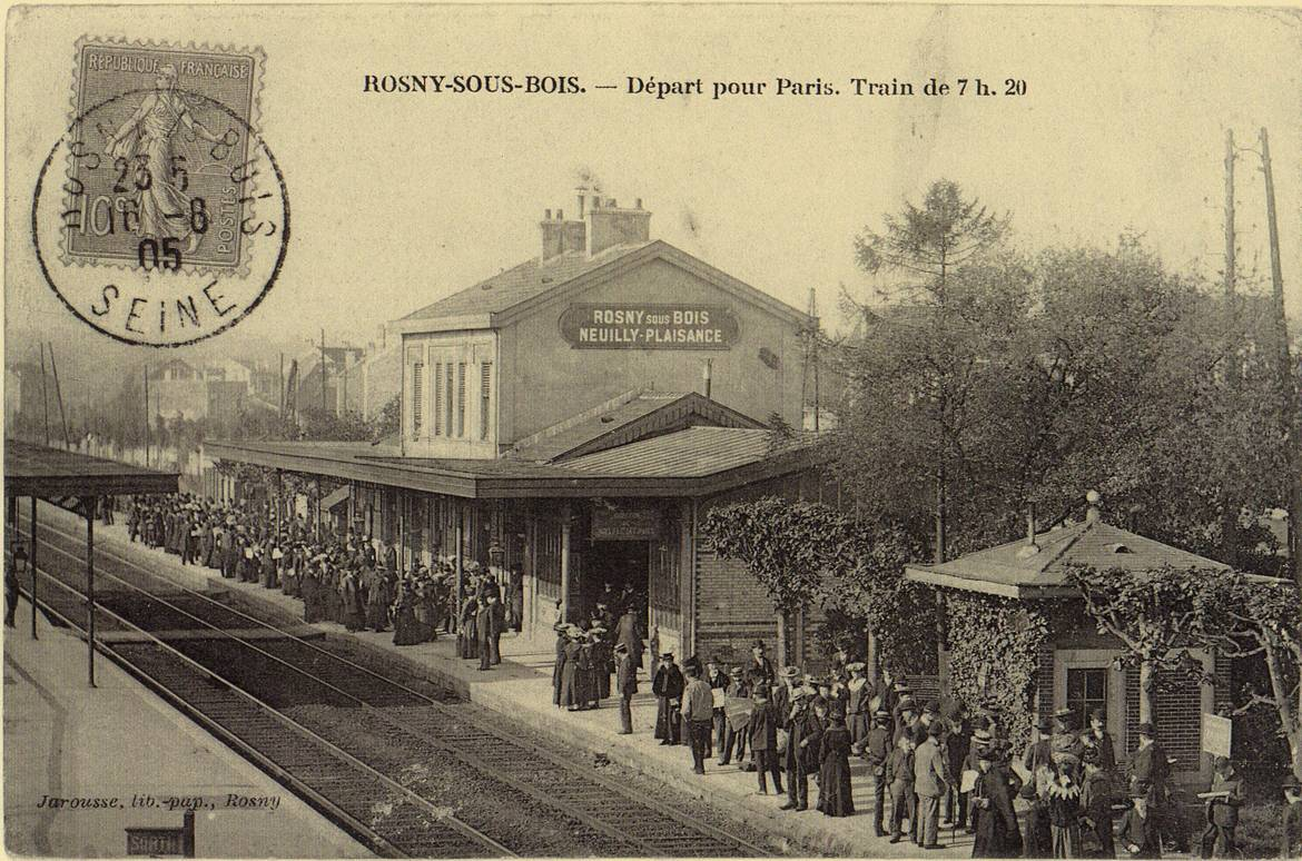 Carte postale ancienne éditée par Jarousse Rosny-sous-Bois : Départ pour Paris - Train de 7h20 (bâtiment de la gare de 1856)